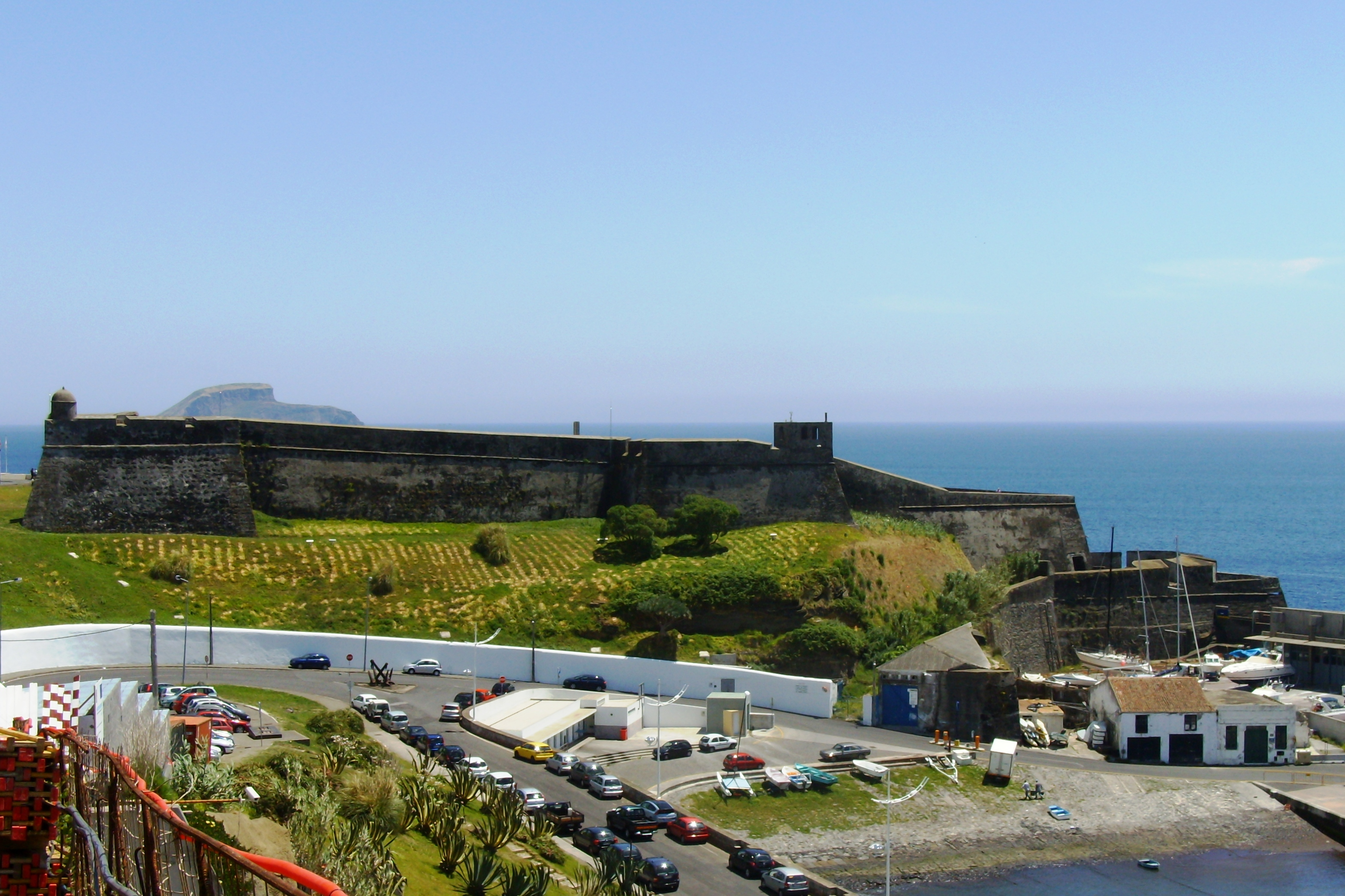 Forte de São Sebastião, freguesia de Nossa Senhora da Conceição, cidade e concelho de Angra do Heroísmo, ilha Terceira, Açores.